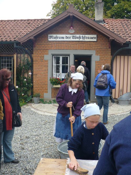 Museum der Waschfrauen in Ochsenhausen, Deutschland